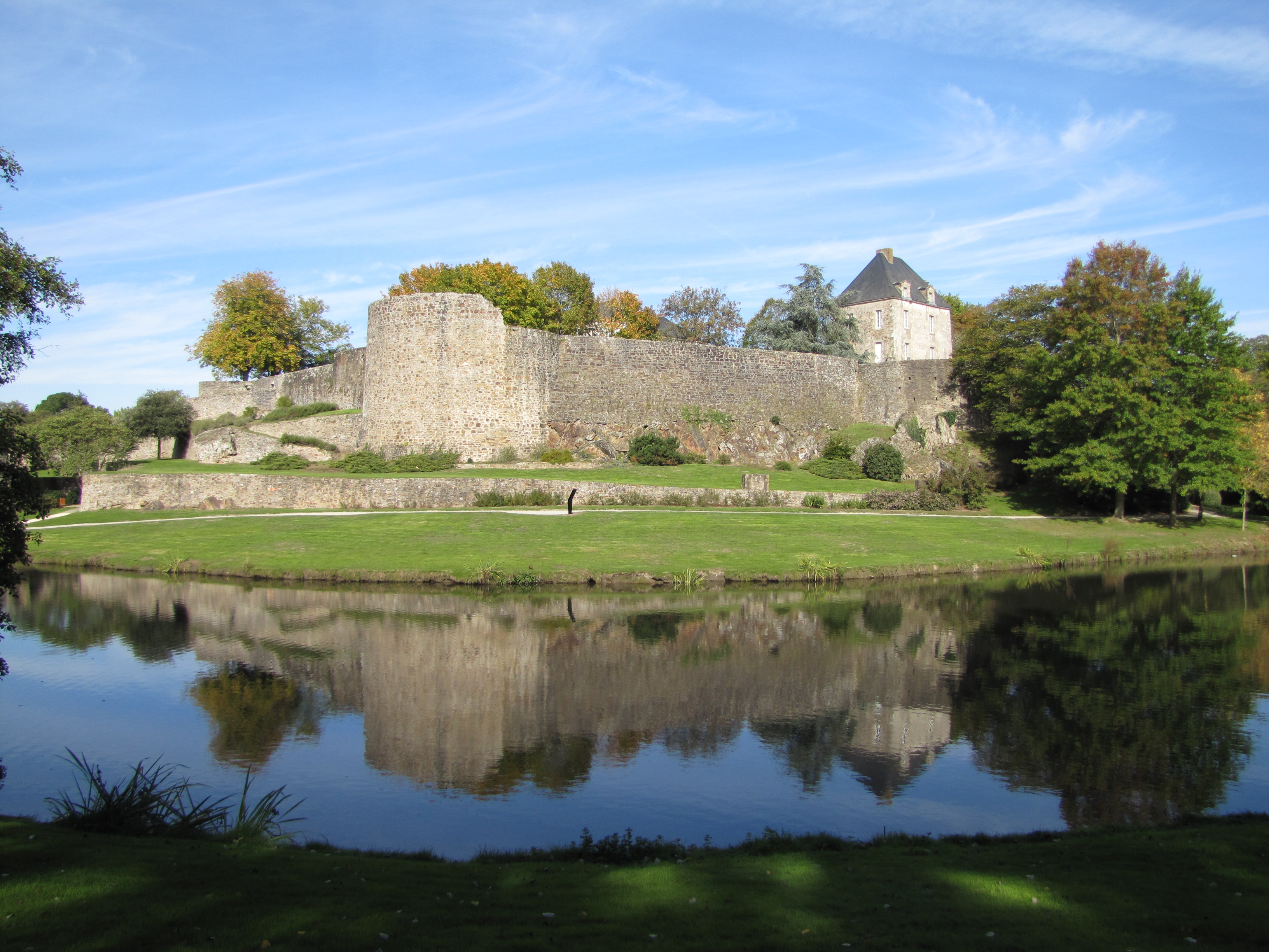 Ancien Château, (Inscrit, 1952) .